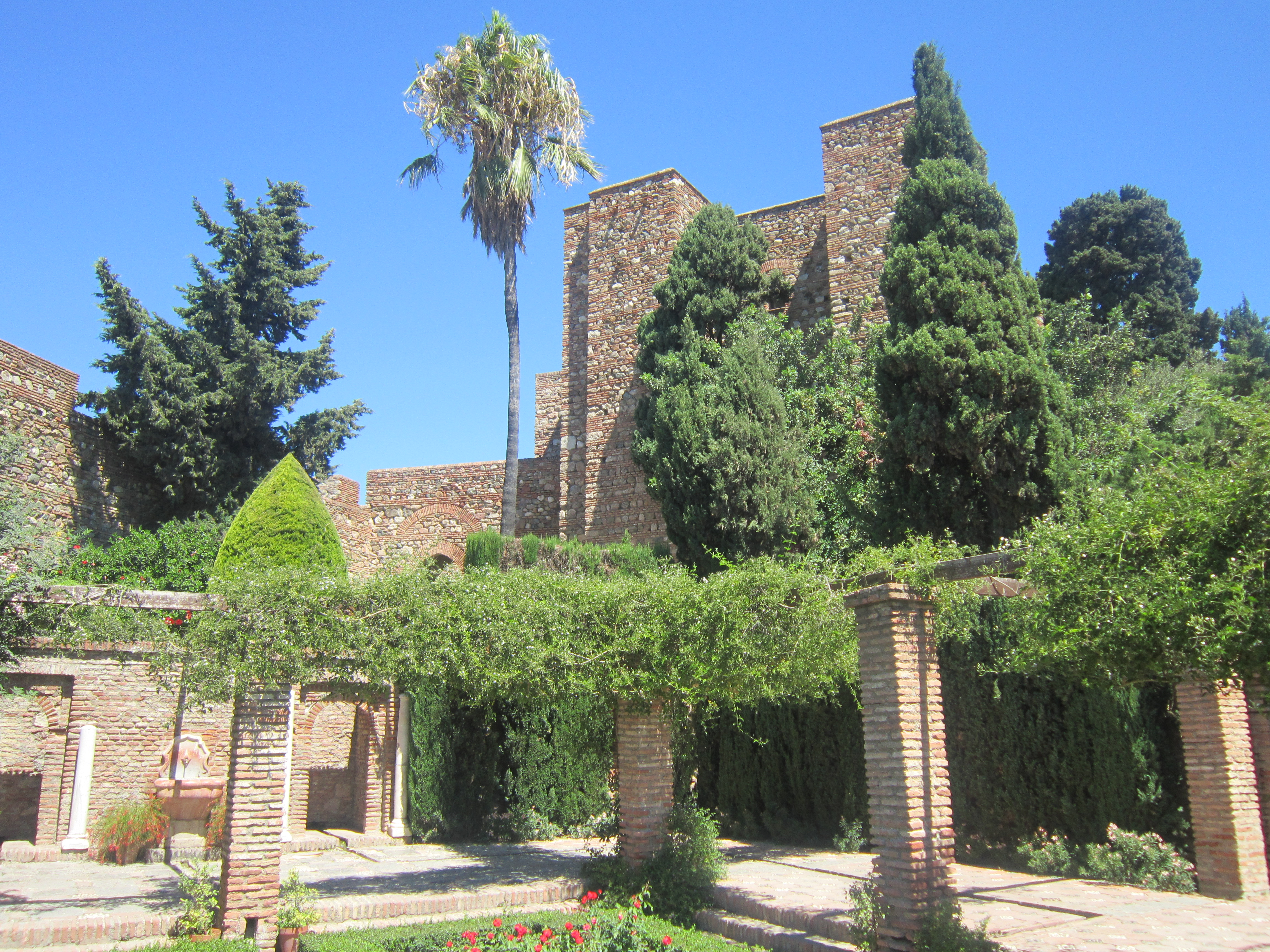 arabic gardens of Alcazaba de Malaga